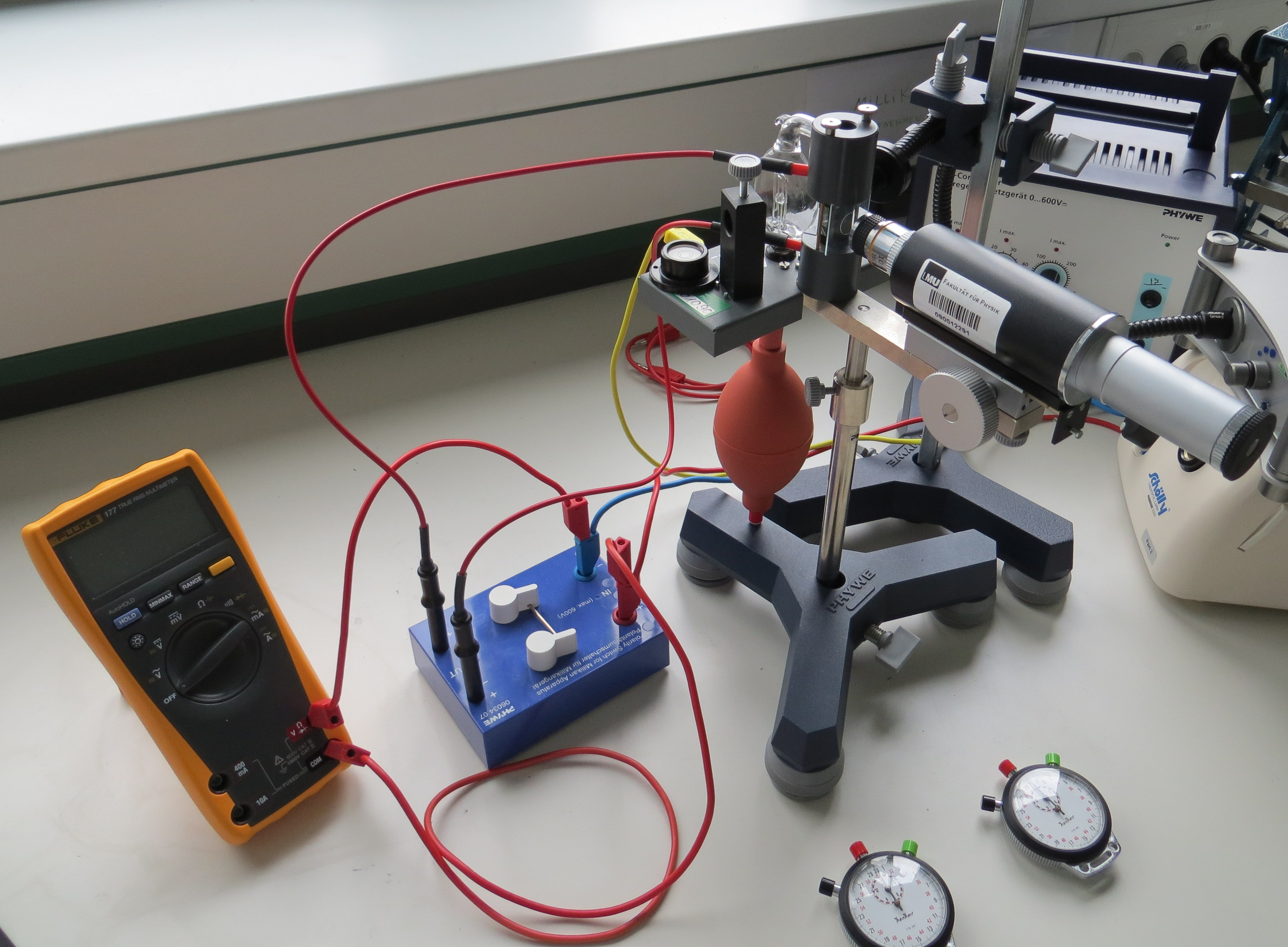 Foto vom Millikan-Versuch